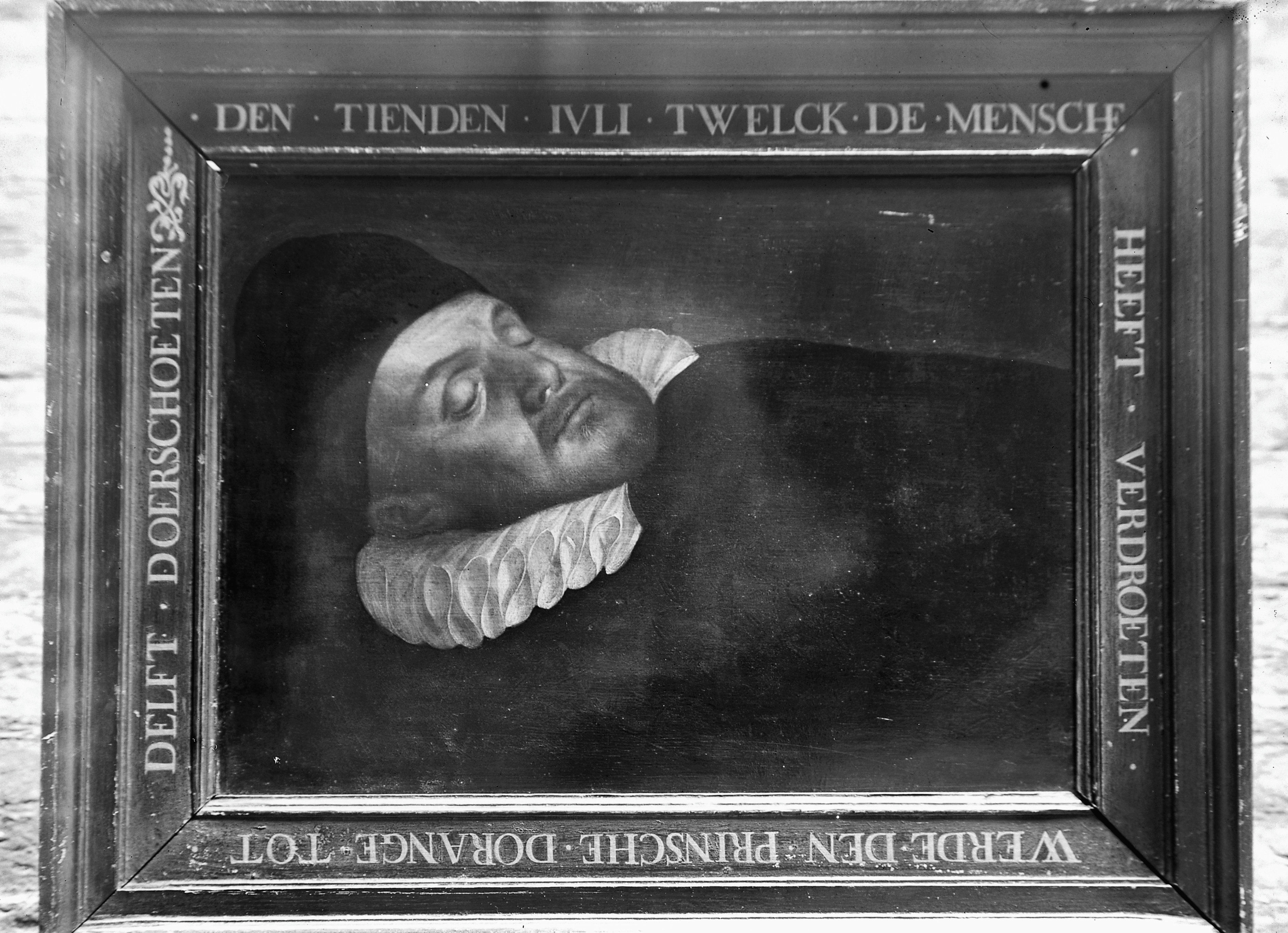 Raadhuis: Schilderij, Prins Willem I